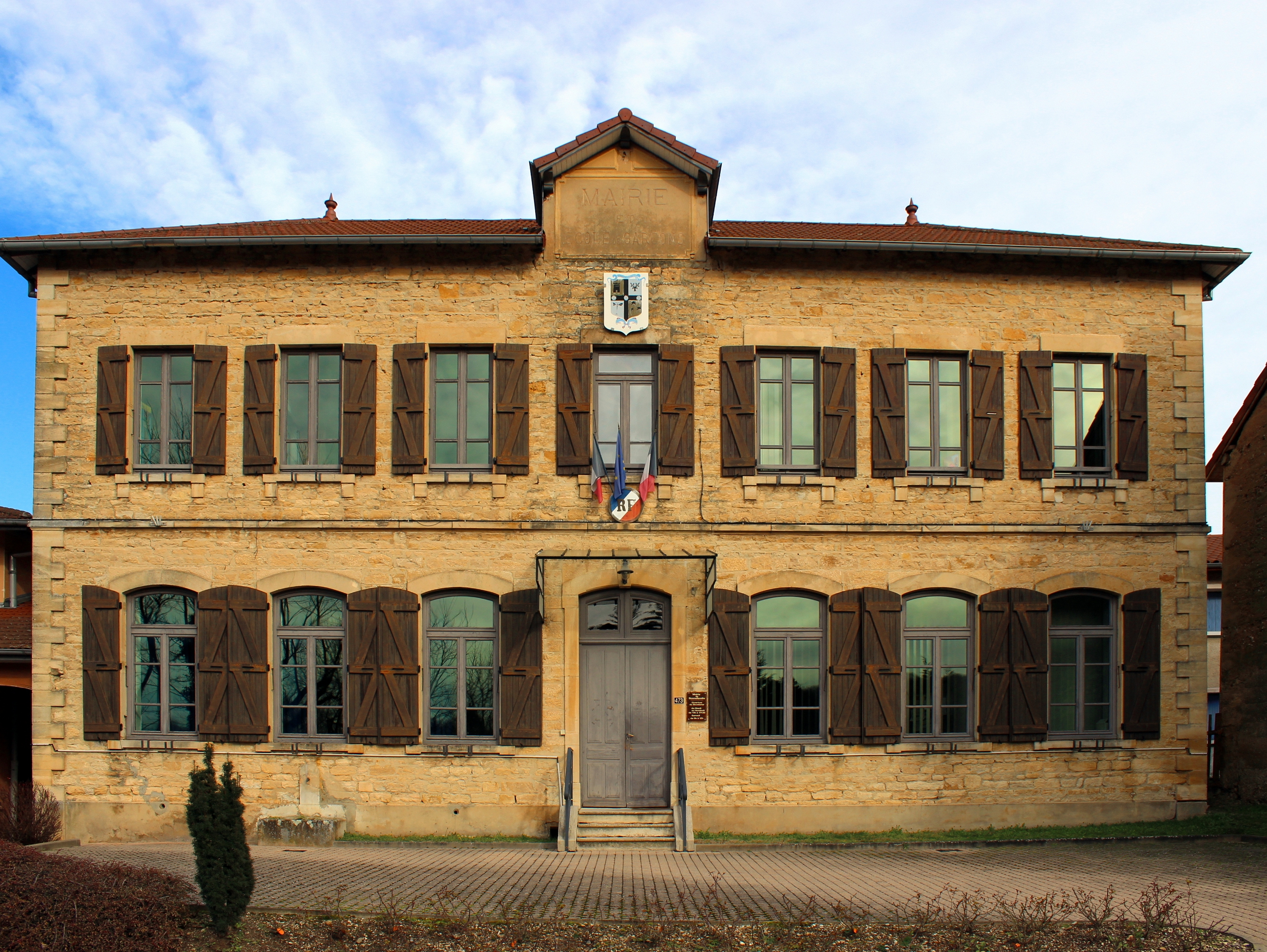 Hotel de ville de Bonnefamille.